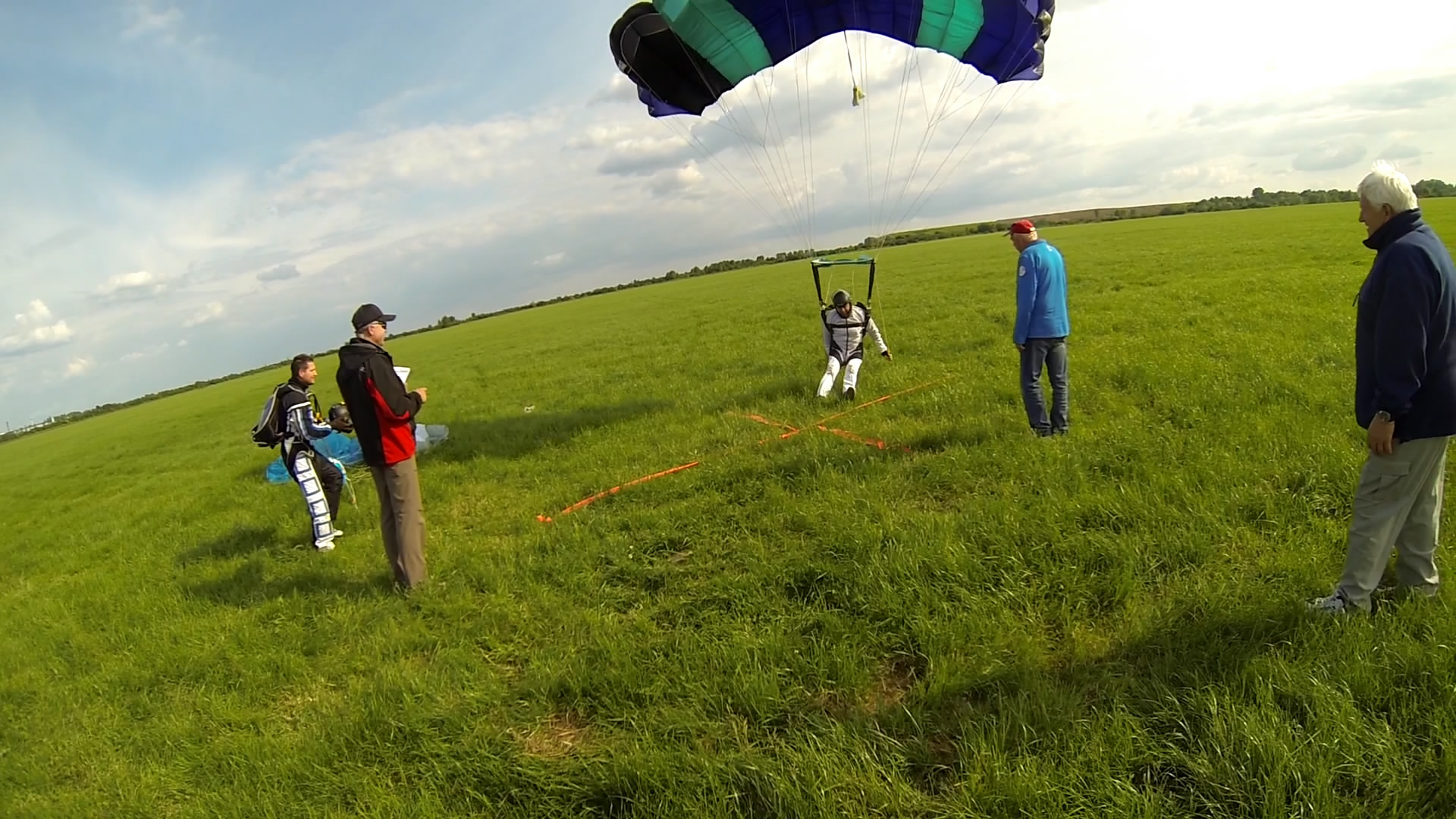 Spadochronowe Mistrzostwa Śląska 2014 - konkurencja spadochrony szybkie. Ląduje Bartłomiej Ryś, po wykonanym skoku Tymoteusz Tabor — Sekcja Spadochronowa Aeroklubu Gliwickiego